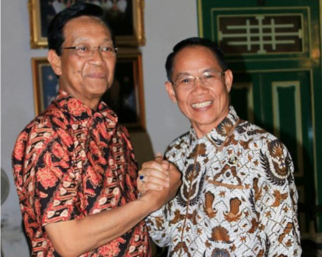 Rusmadi Wongso Sekda Prov. Kaltim saat bersama dengan Sri Sultan Hamengkubuwono ke X